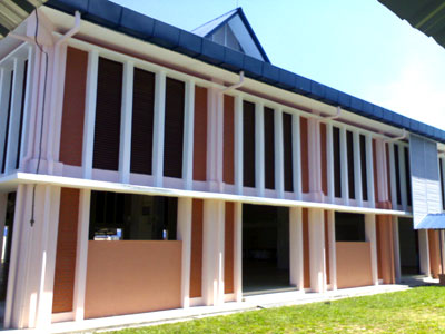 Dewan Selera